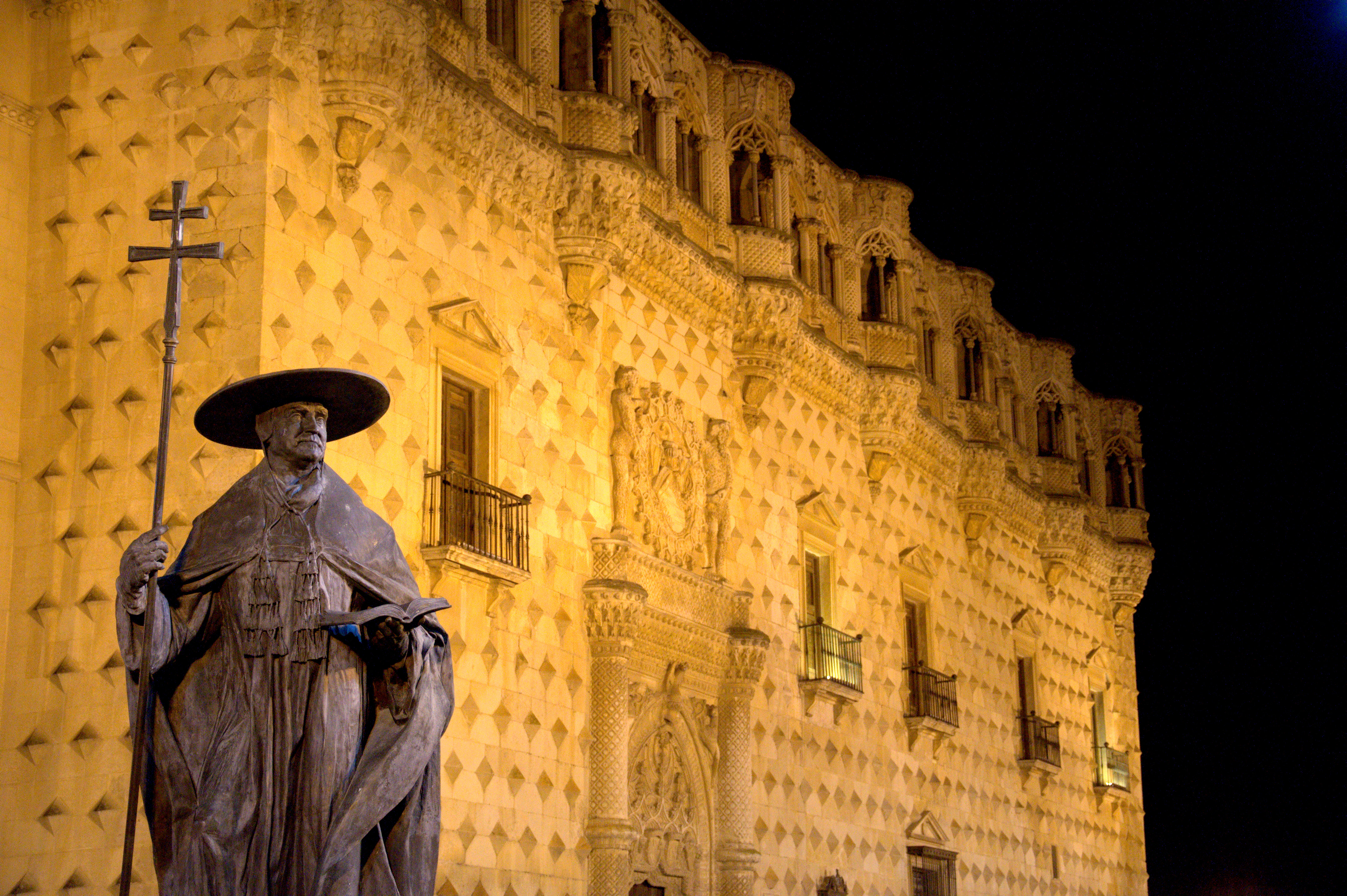 Pedro González de Mendoza ante el Palacio del Infantado.